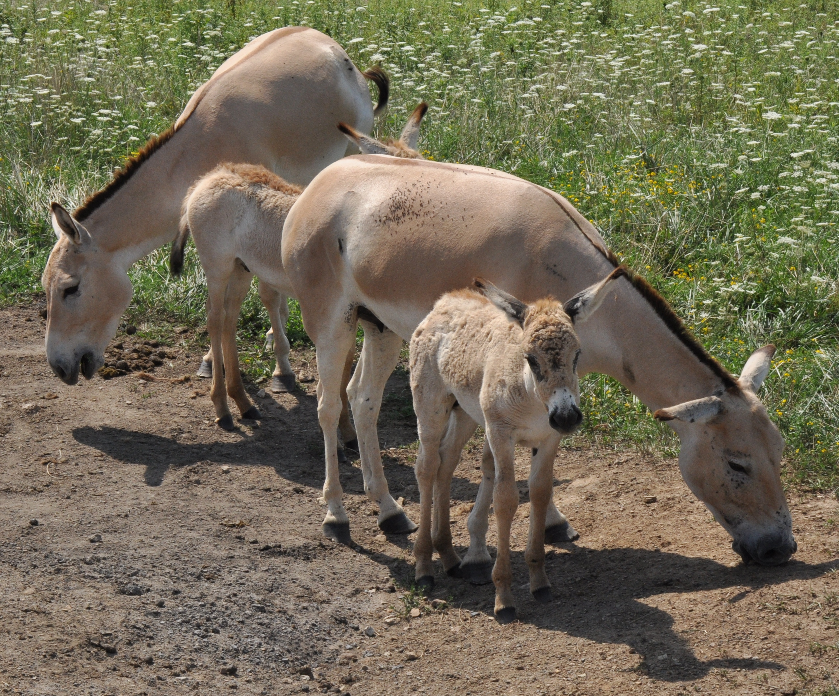 Persian Onager